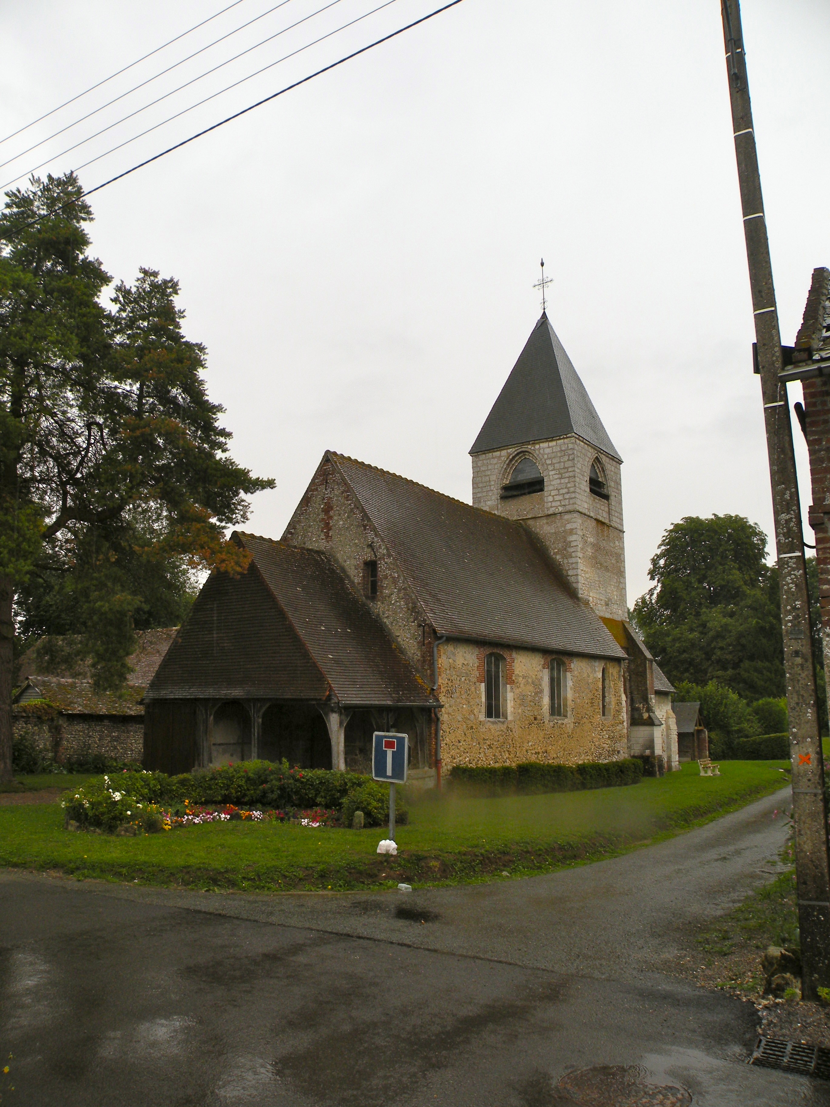 Église Notre-Dame de Lachapelle-sous-Gerberoy